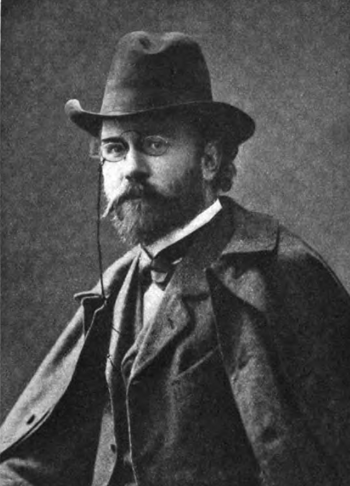 Hanns von Gumppenberg. In: Literarisches Echo, Band 6. Hrsg. Josef Ettlinger, Deutsch-Österreichische Literatur-Gesellschaft. Berlin: Fleischel & Co., 1903/04, S. 10